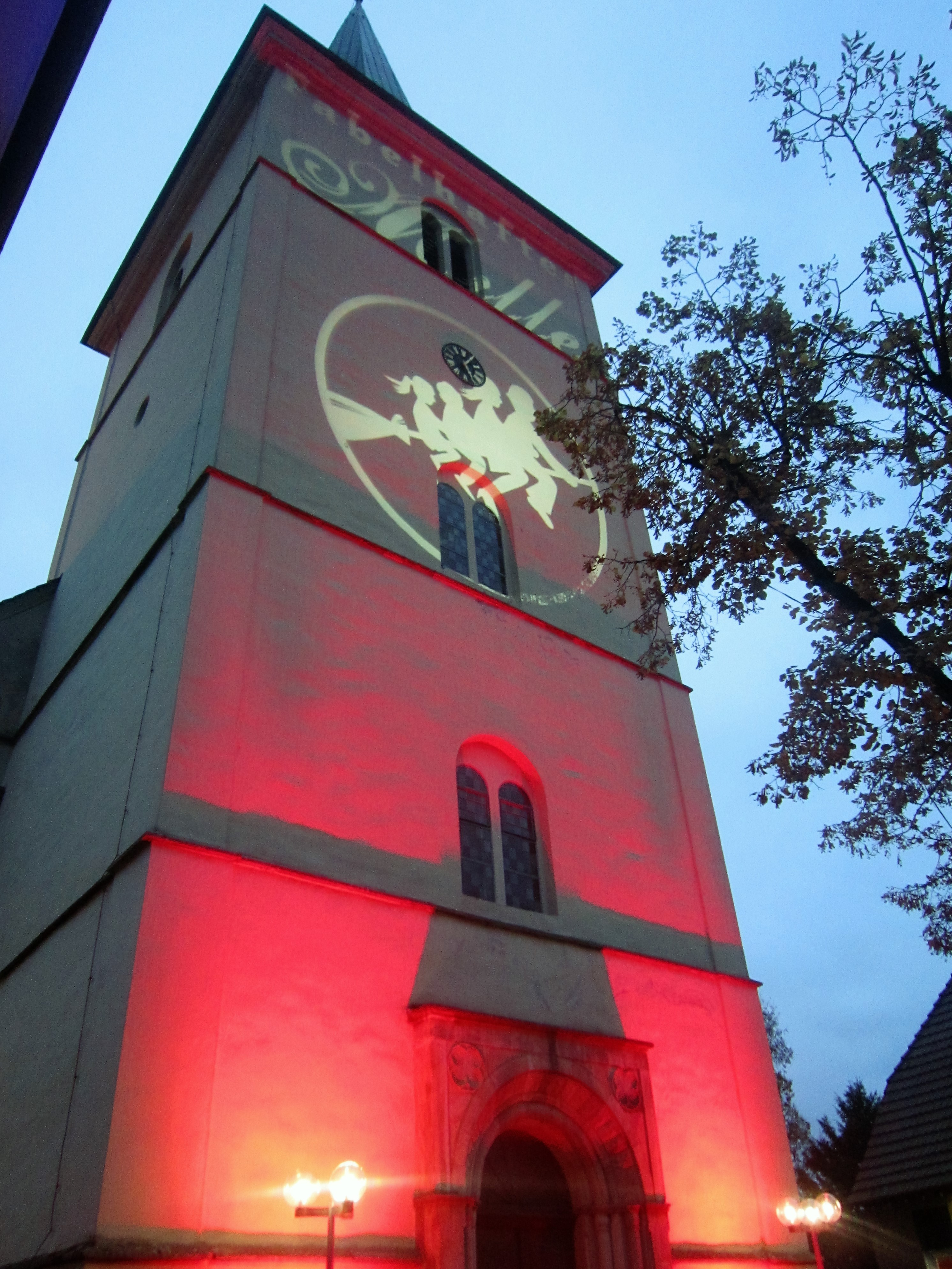 "Fabelhaftes Melle 2016": Illuminierte Kirche St. Petri